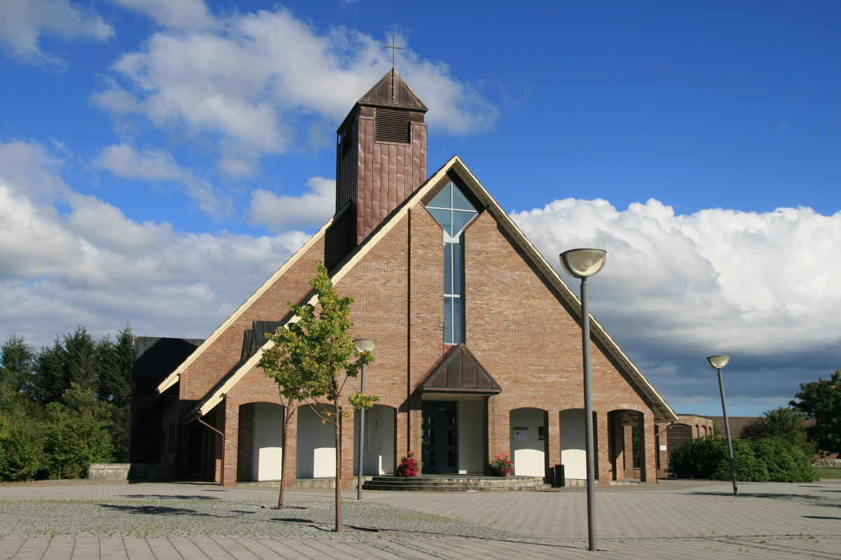 Aksdal kirke